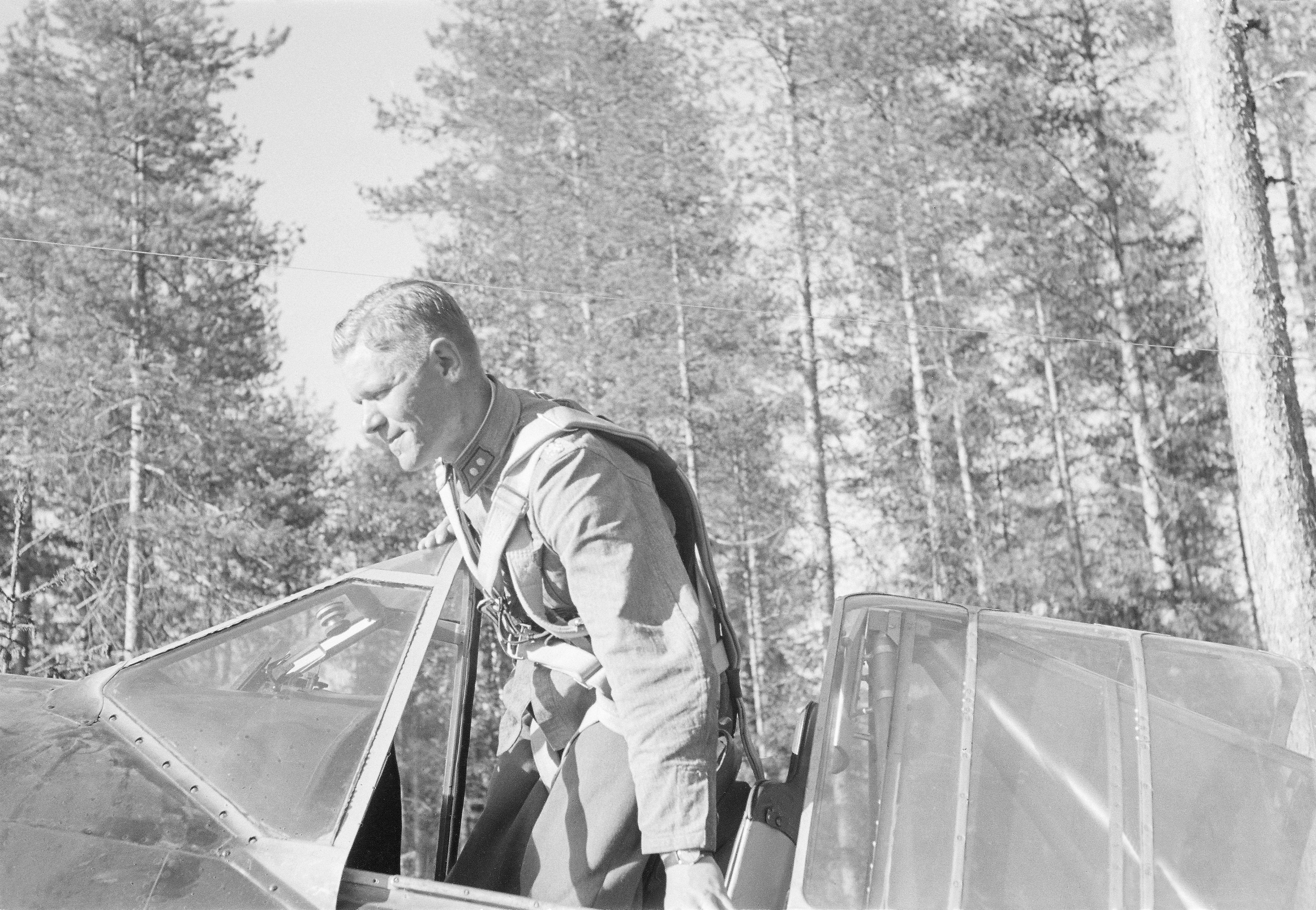 Luutn. Sarvanto juuri saapuneena lennoltaan, jonka aikana hän pudotti yhden koneen. (Luutnantti Jorma Kalevi Sarvanto. Kuva Selänpään kentältä, 2./Lentolaivue 24.)